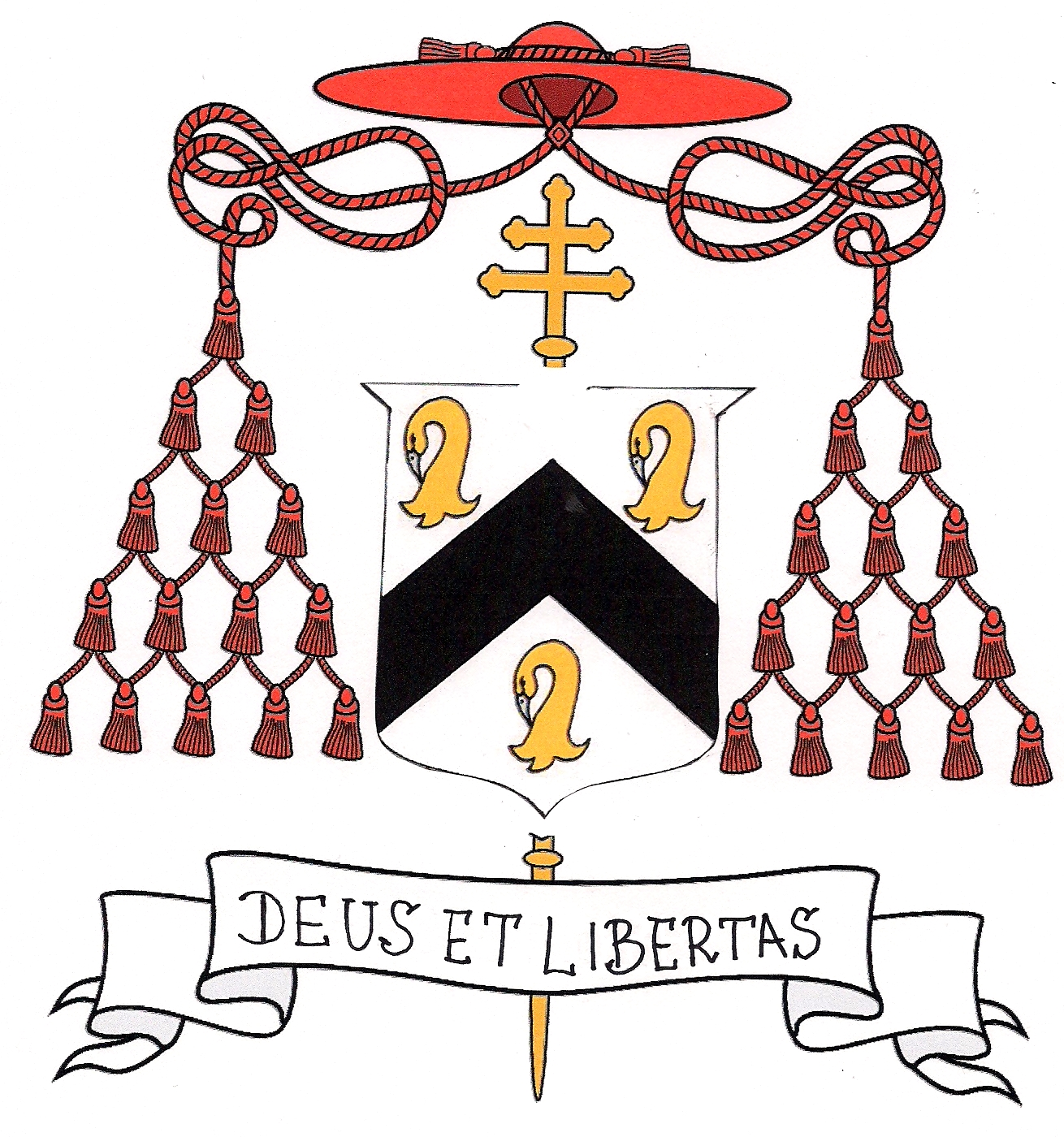 Herb kardynała Williama Godfrey'a